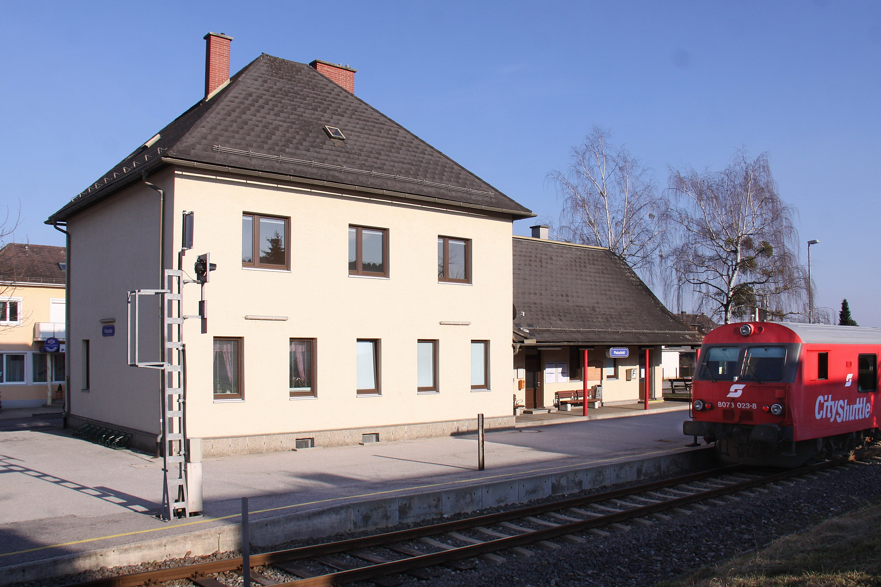 Pinkafeld - ehemaliger Bahnhof Pinkafeld Object location47° 22′ 14.1″ N, 16° 06′ 59.19″ E